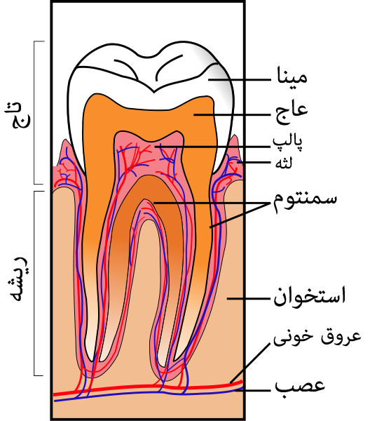 برشی از دندان که ساختمان و نام اجزای دندان را مشخص کرده‌است.